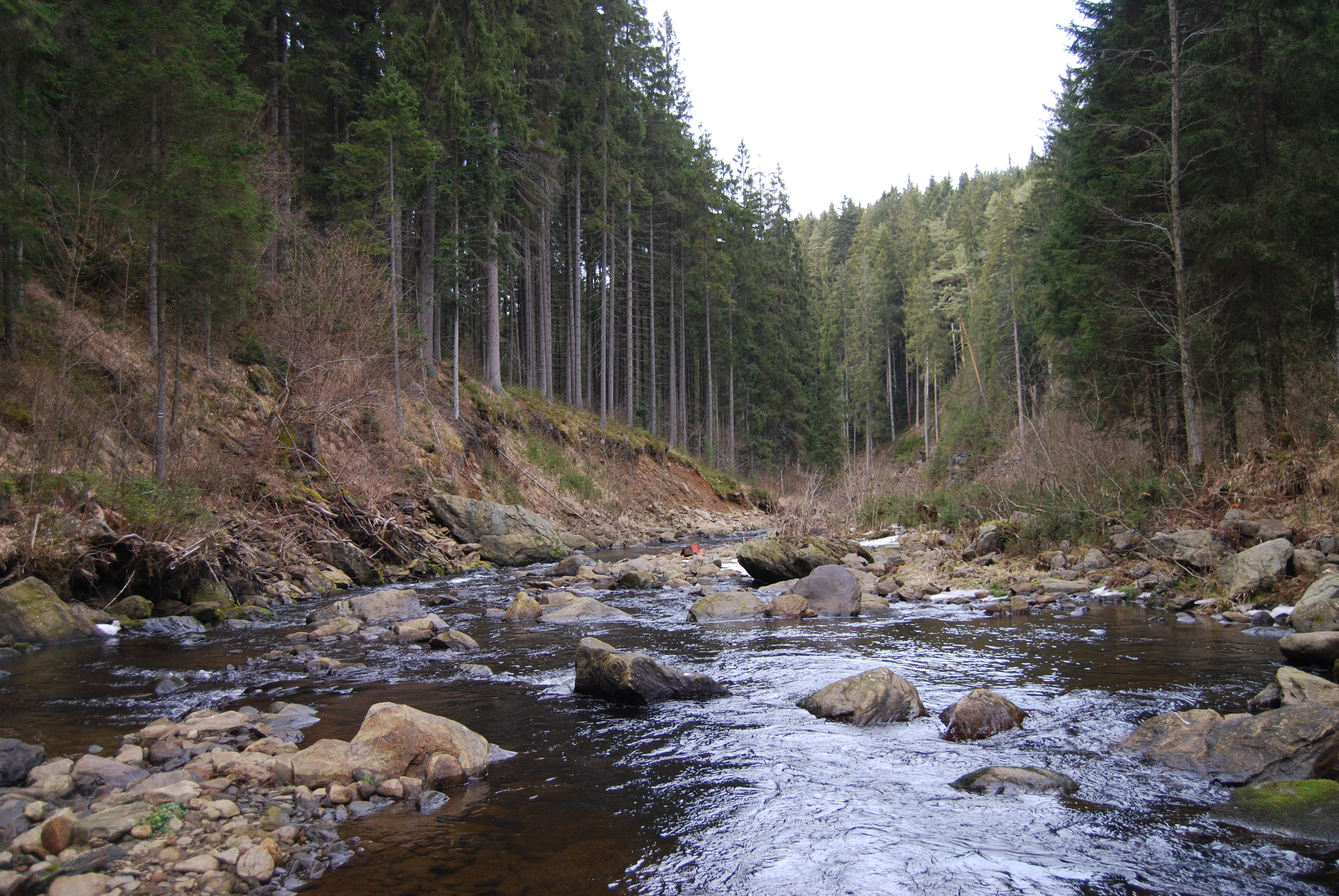 Řeka Blanice u přístupové stezky ke zřícenině. Hus - zřícenina hradu 2 km západně od Blažejovic v okrese Prachatice. Česká republika.